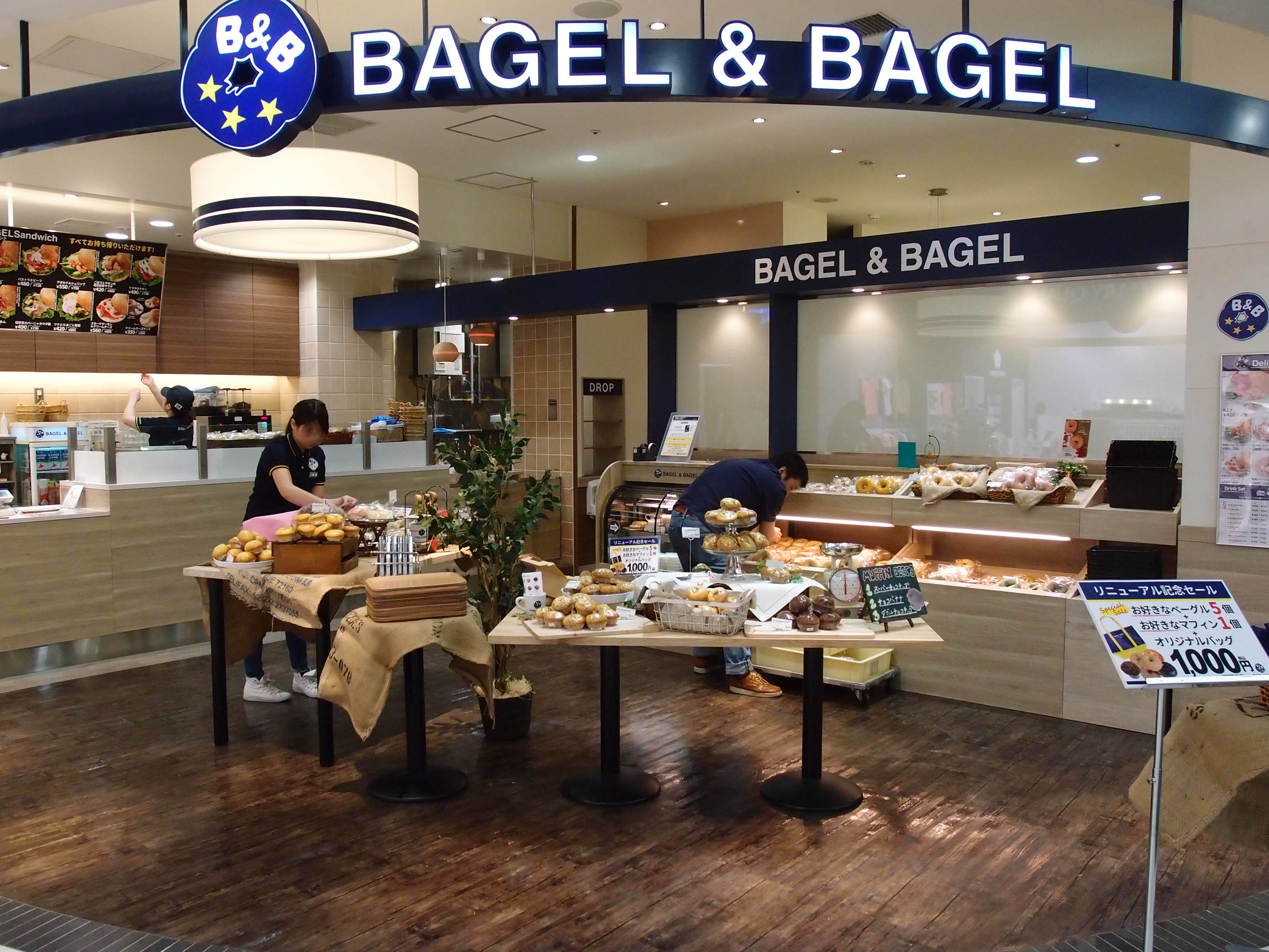 青森ELM店